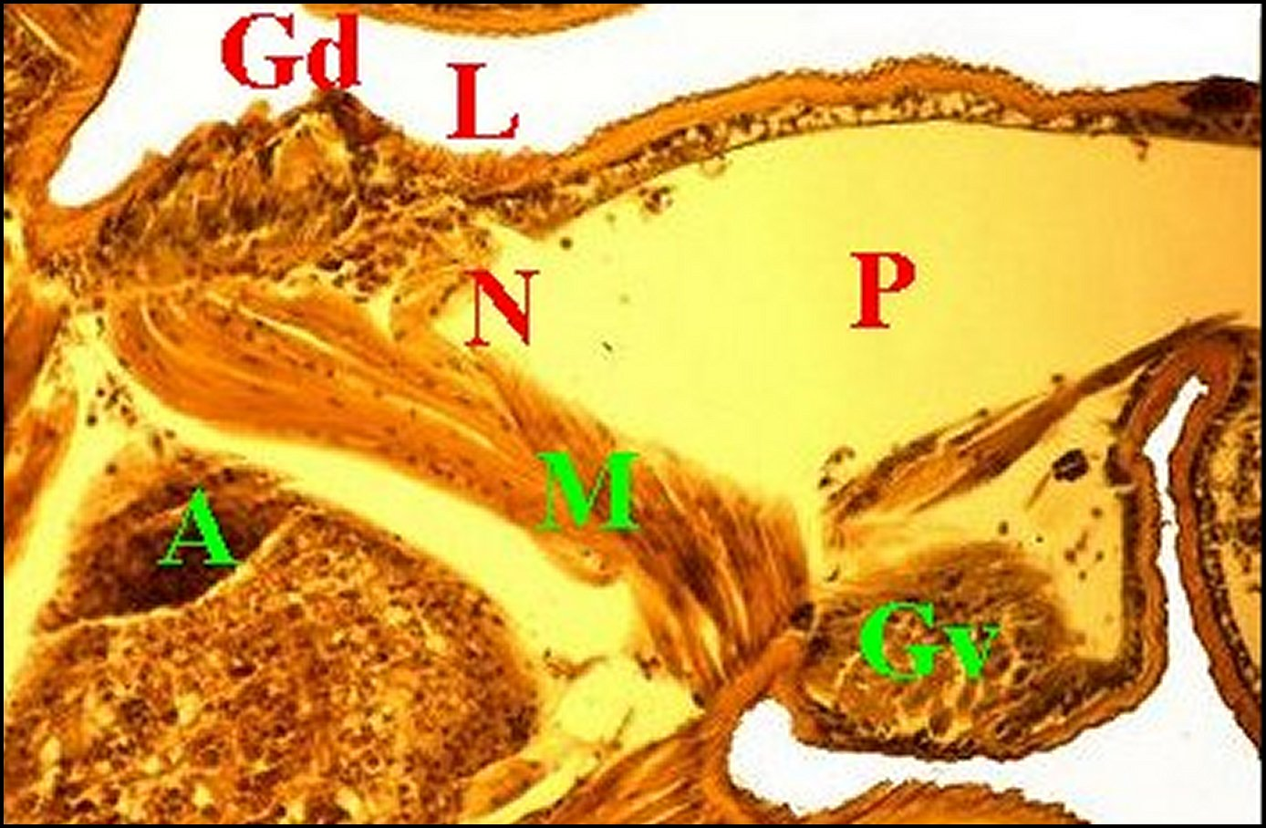 Coupe histologique parasagittale d'un pédicule de Meta bourneti, avec ses glandes et organe en bourrelet dans la partie postérieure.